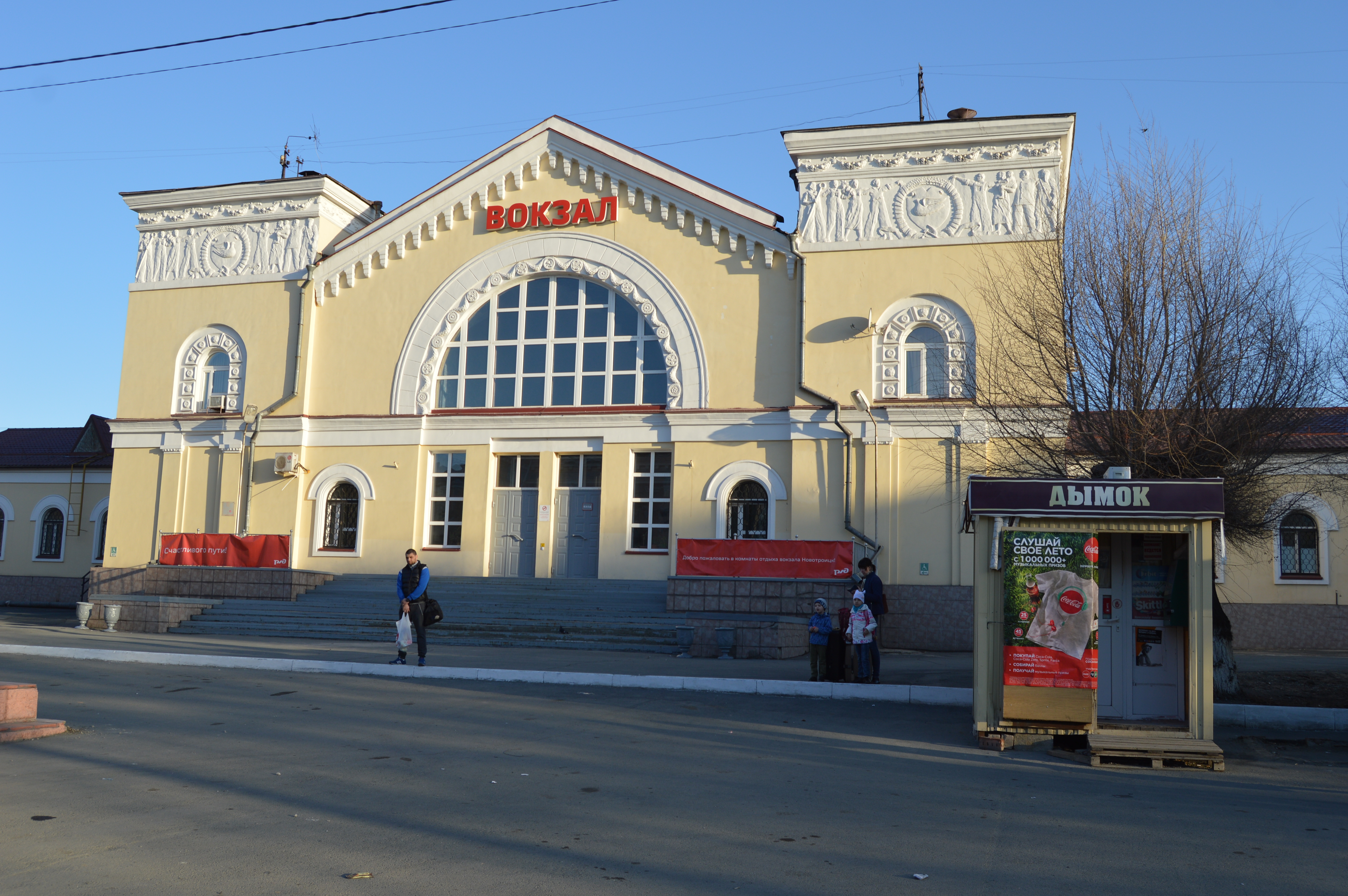 Здание железнодорожного вокзала в Новотроицке,Оренбургская область.